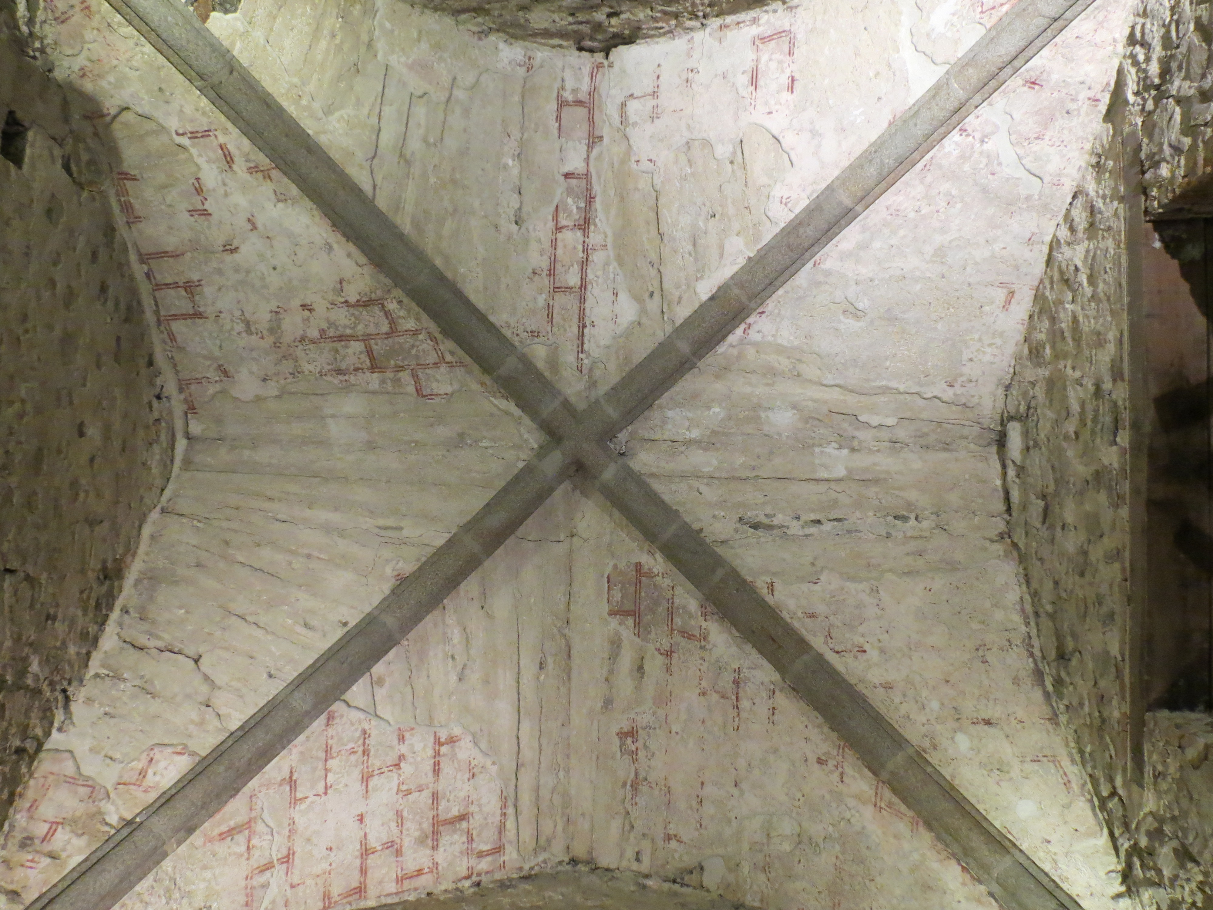 Palais carolingien du château de Mayenne, Pays de la Loire.